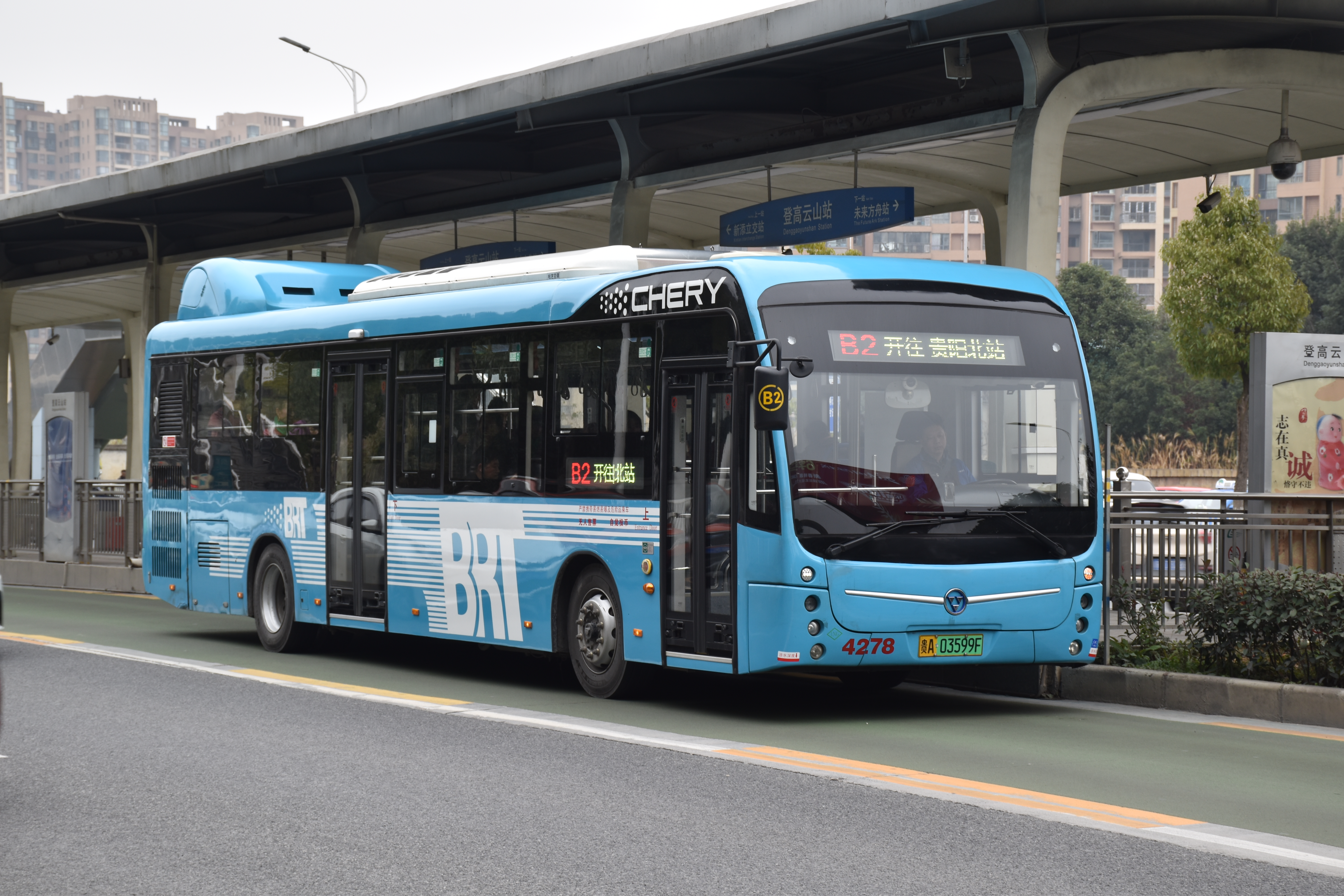 中文（中国大陆）: 贵阳快速公交B2线 03599F，摄于登高云山站